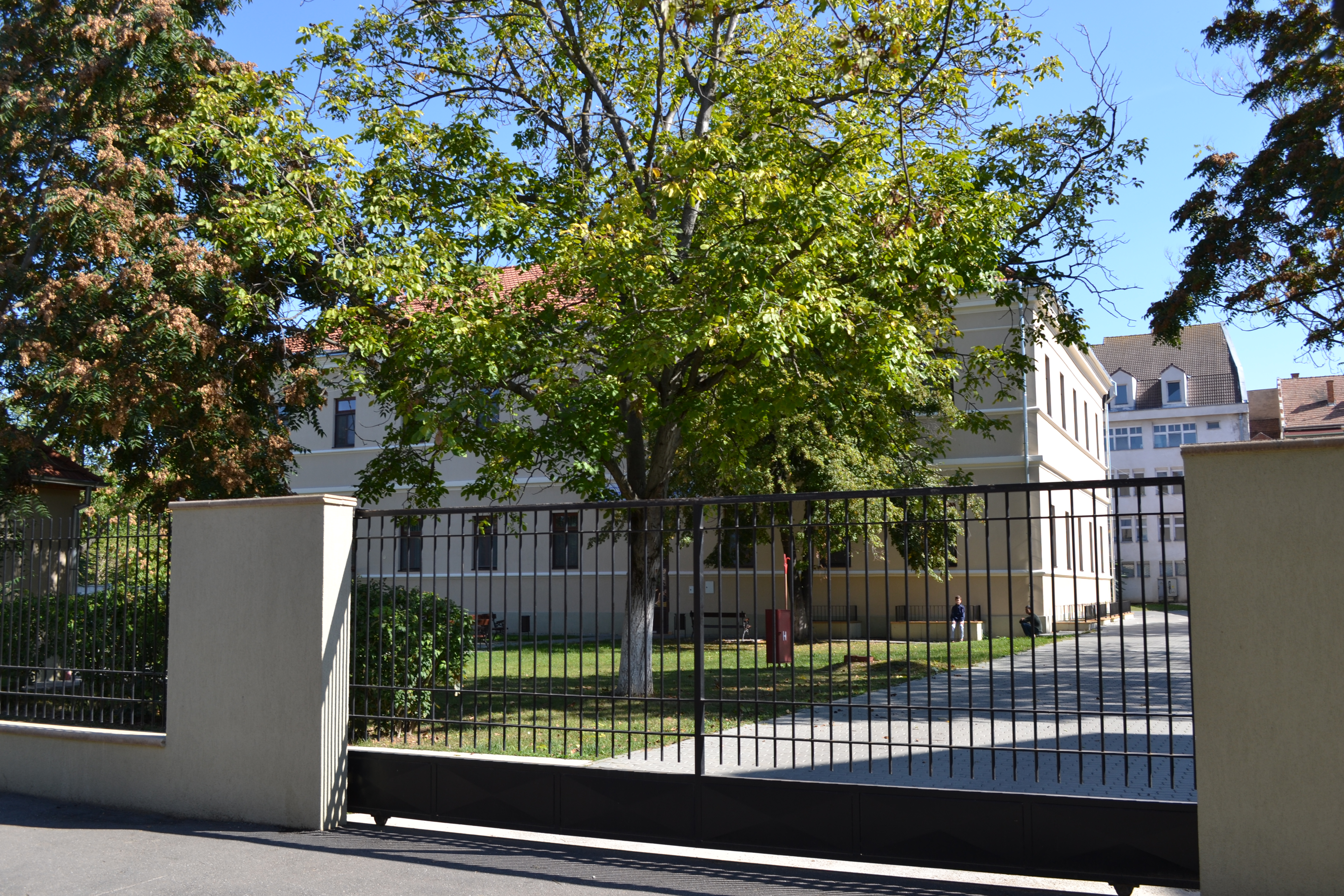 Spitalul de boli contagioase